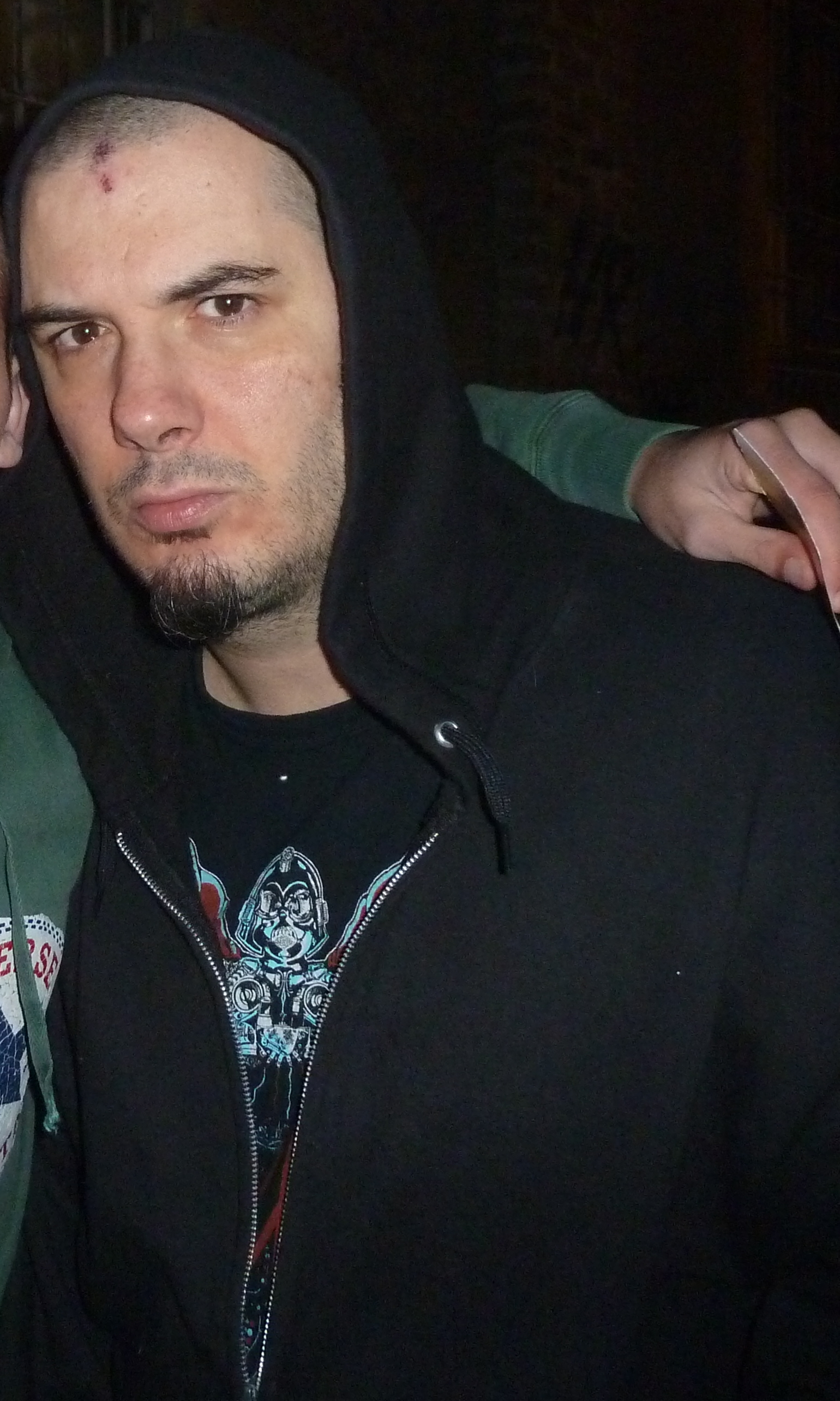 Phil Anselmo dopo il concerto dei Down ai Magazzini Generali di Milano del 29 ottobre 2012.